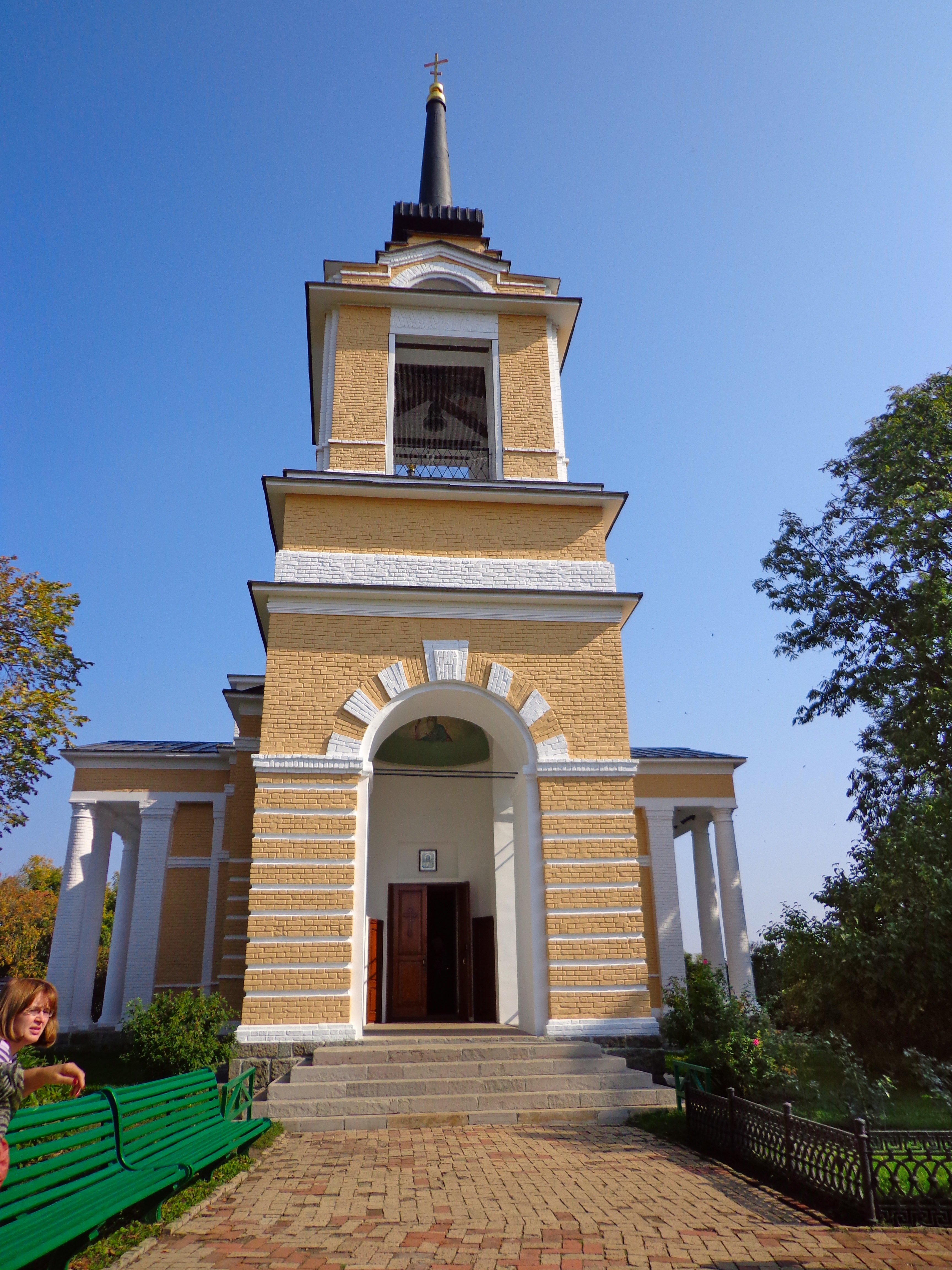 Церковь Михаила Архангела (Пензенская область, Белинский, село Лермонтово, Государственный Лермонтовский музей-заповедник "Тарханы")